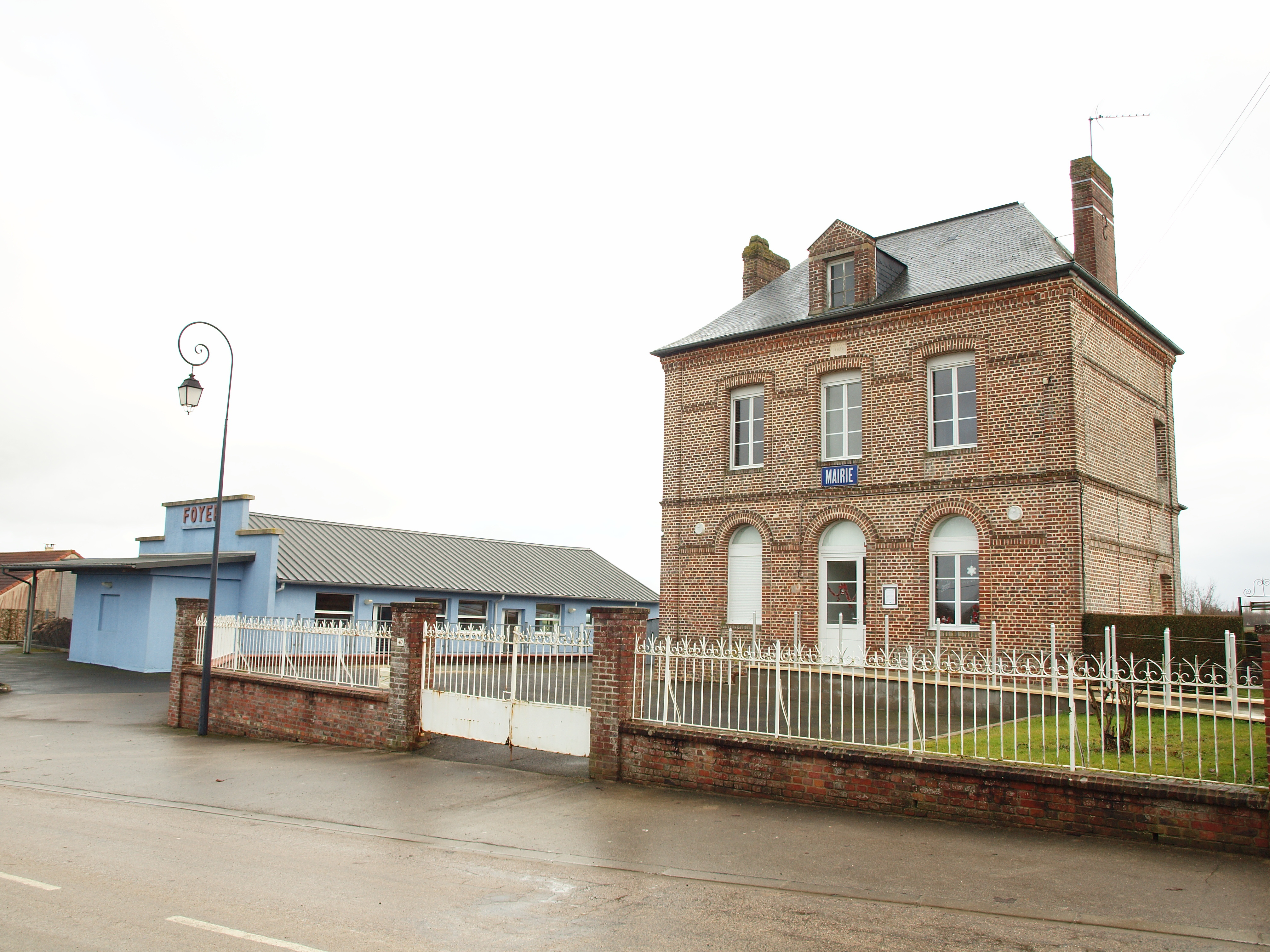 Roncherolles-en-Bray (Seine-Maritime, France)